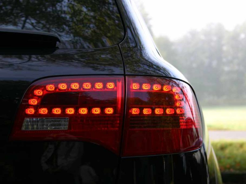 Rücklicht eines Audi A6 Avant (Modell C6)